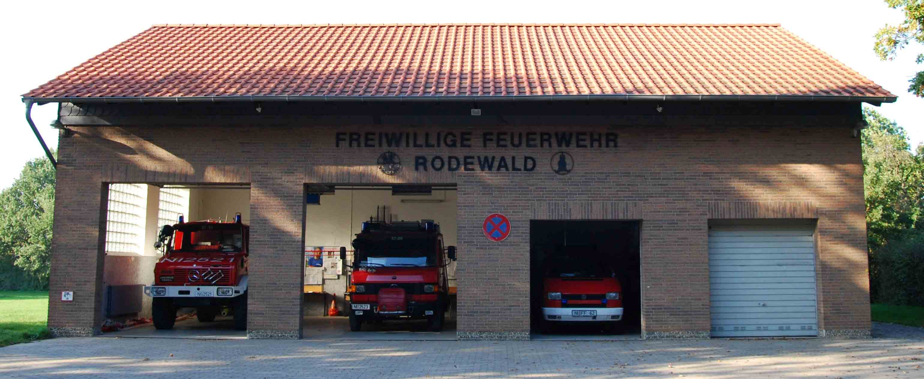 Copyright Freiwillige Feuerwehr Rodewald